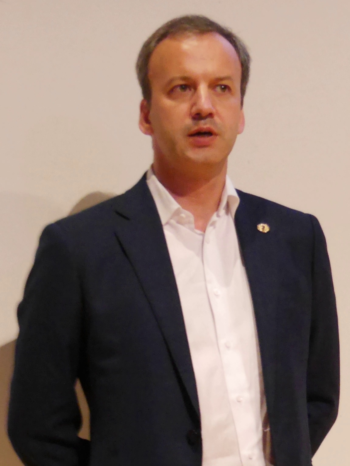 Arkady Vladimirovich Dvorkovich, Dortmunder Schachtage 2018.